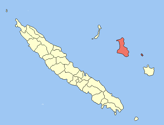 Position de Lifou poar rapport à la Nouvelle-Calédonie